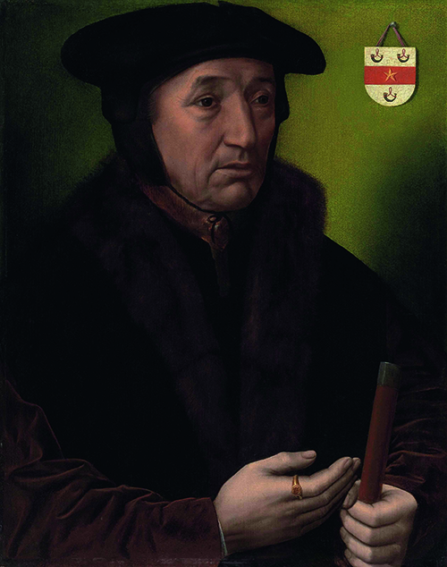 Ambrosius Benson, Portret van Jean Wyts, watergraaf van Mechelen, 1520-1530, olieverf op paneel, 56 x 47,5 x 4 cm.